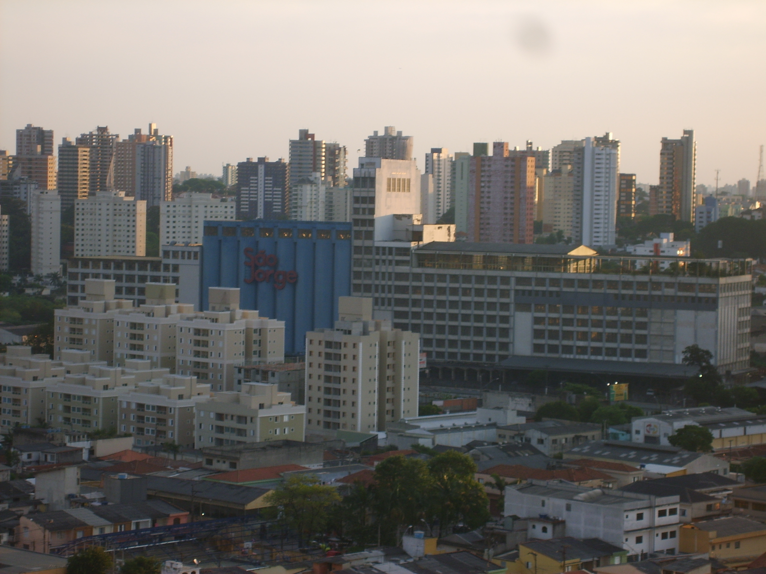 A fabrica do moinho são jorge na cidade de santo andré